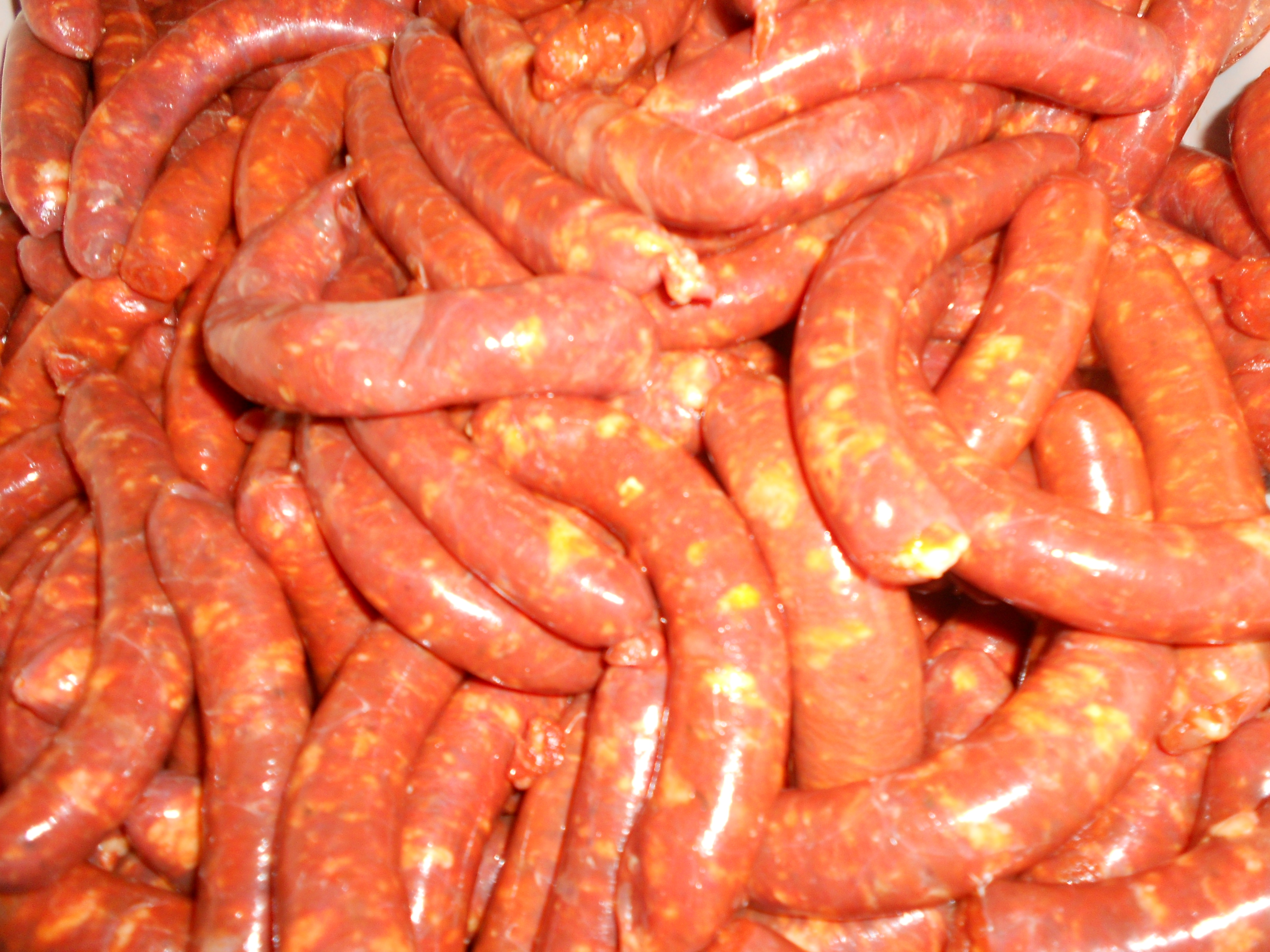 Salchicha de Zaratán blanca y roja, preparadas para cocinar.